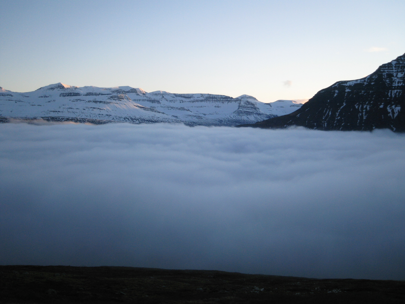 Paisaxe con néboa, Reydarfjördur, Islandia 2007